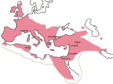 Kristendommens tidlige spredning. Områder hovedsageligt kristnet år 600